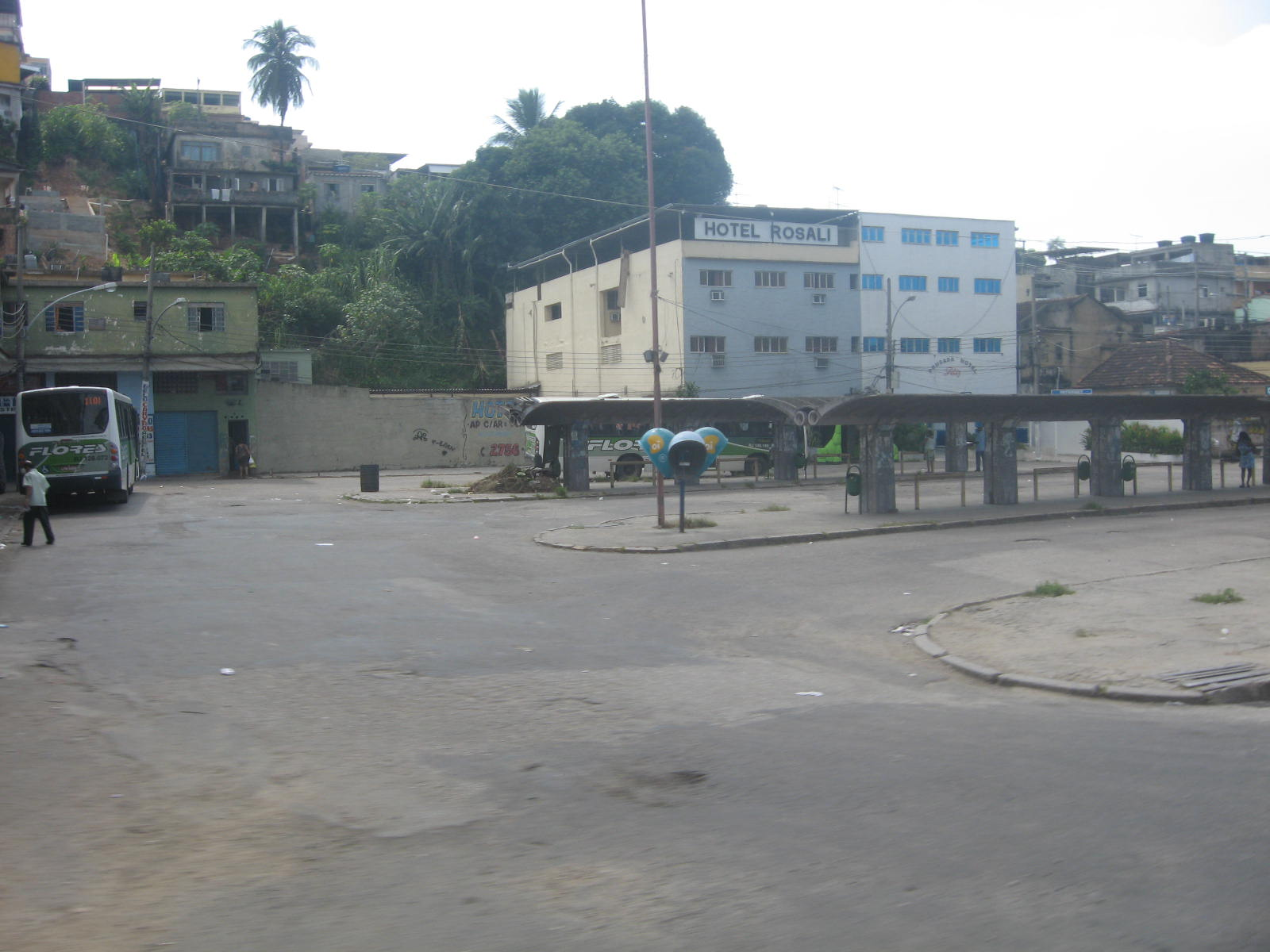 Vista do bairro meritiense de Vila Rosali.